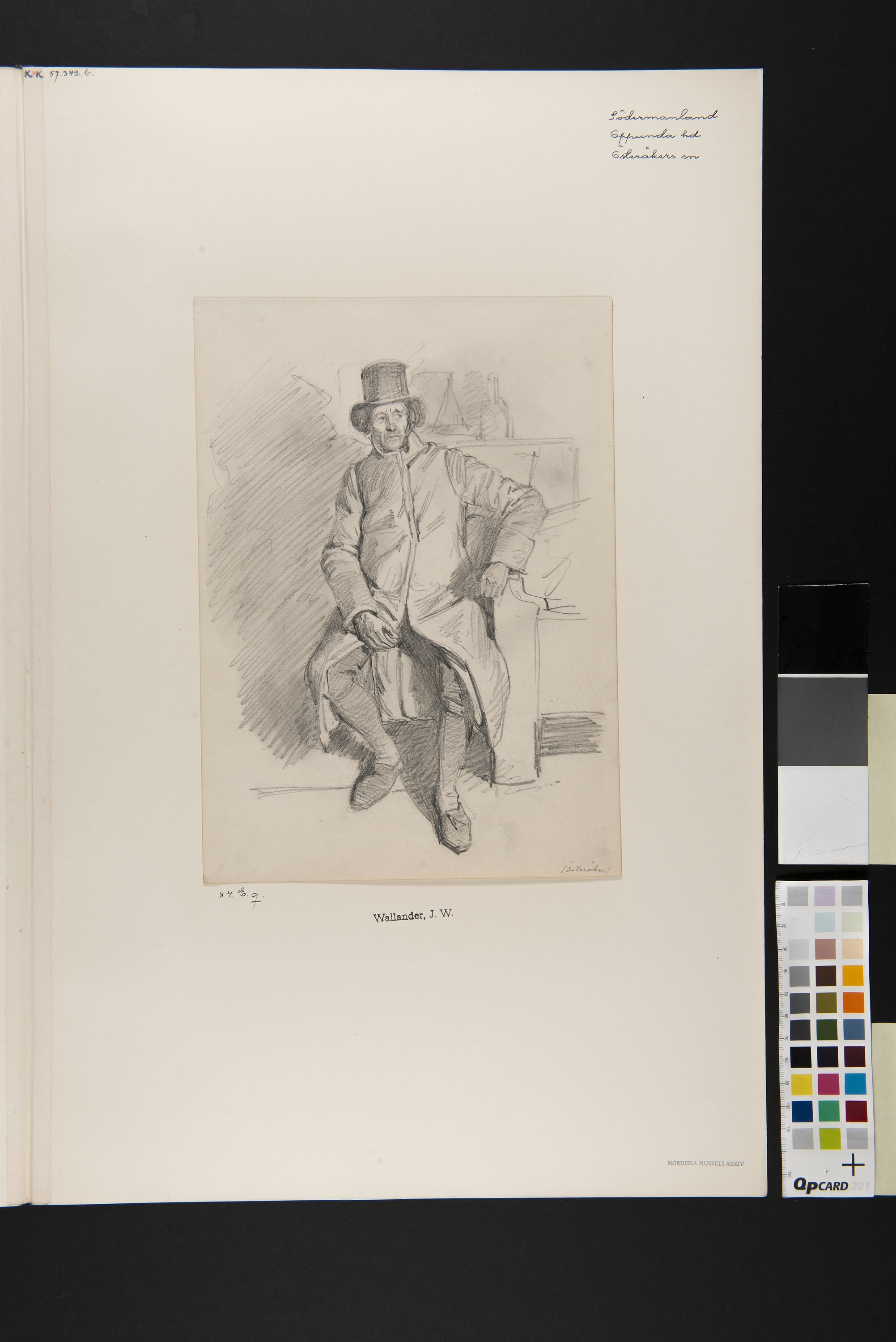 Dräkt. Man sittande med långrock. Akvarell i storformat av J.W. Wallander. Depicted place: Q10610926 (Q10610926) (Härad), Österåkers socken, Södermanland (Q10728184)